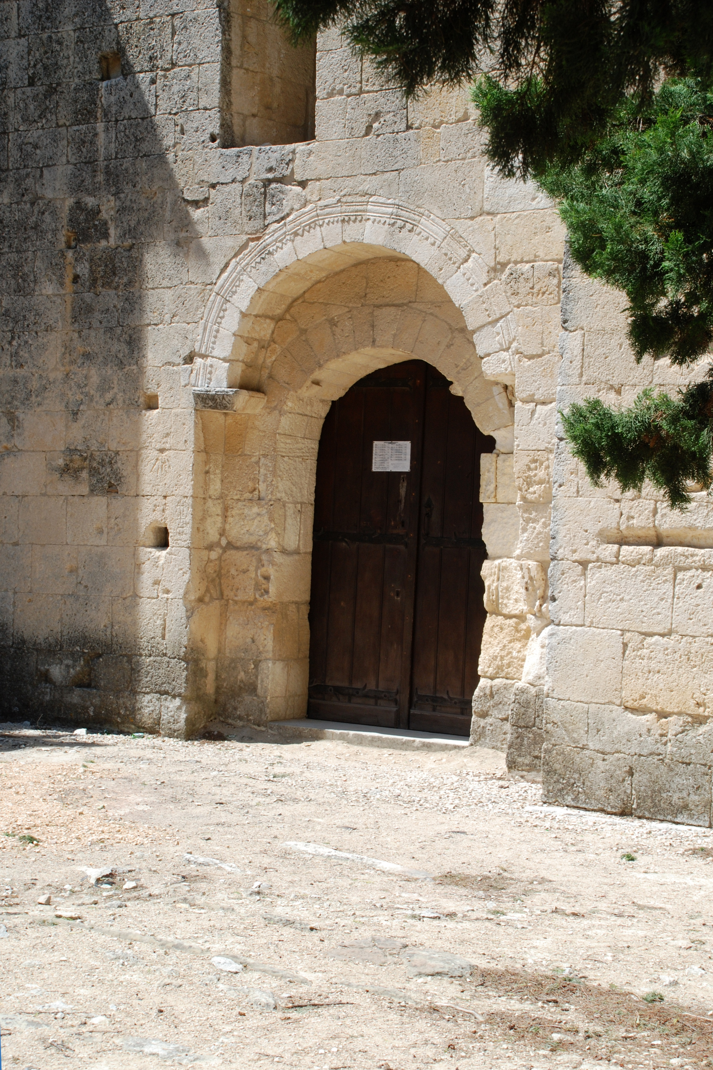 France - Provence - Chapelle Saint-Amand de Théziers